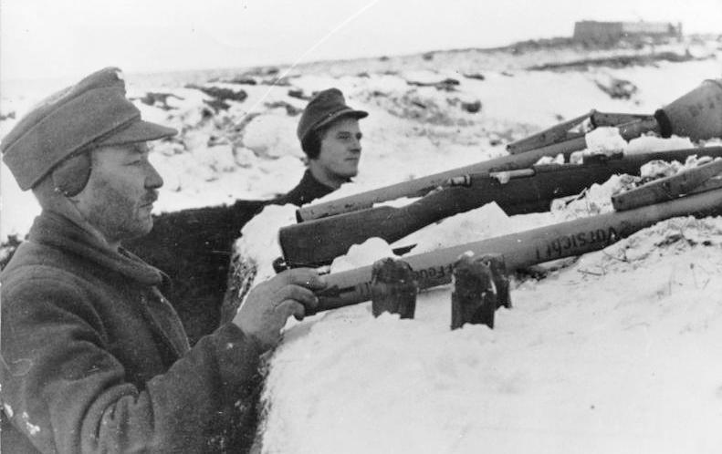 Königsberg, Volkssturm ADN-ZB/ Archiv II. Weltkrieg 1939-45 Deutsch-sowjetische Front in Ostpreußen Mitte Januar 1945: Angehörige des Volkssturmes mit Panzerfäusten in einer Stellung vor Königsberg. [Aufnahme: 20.1.1945]